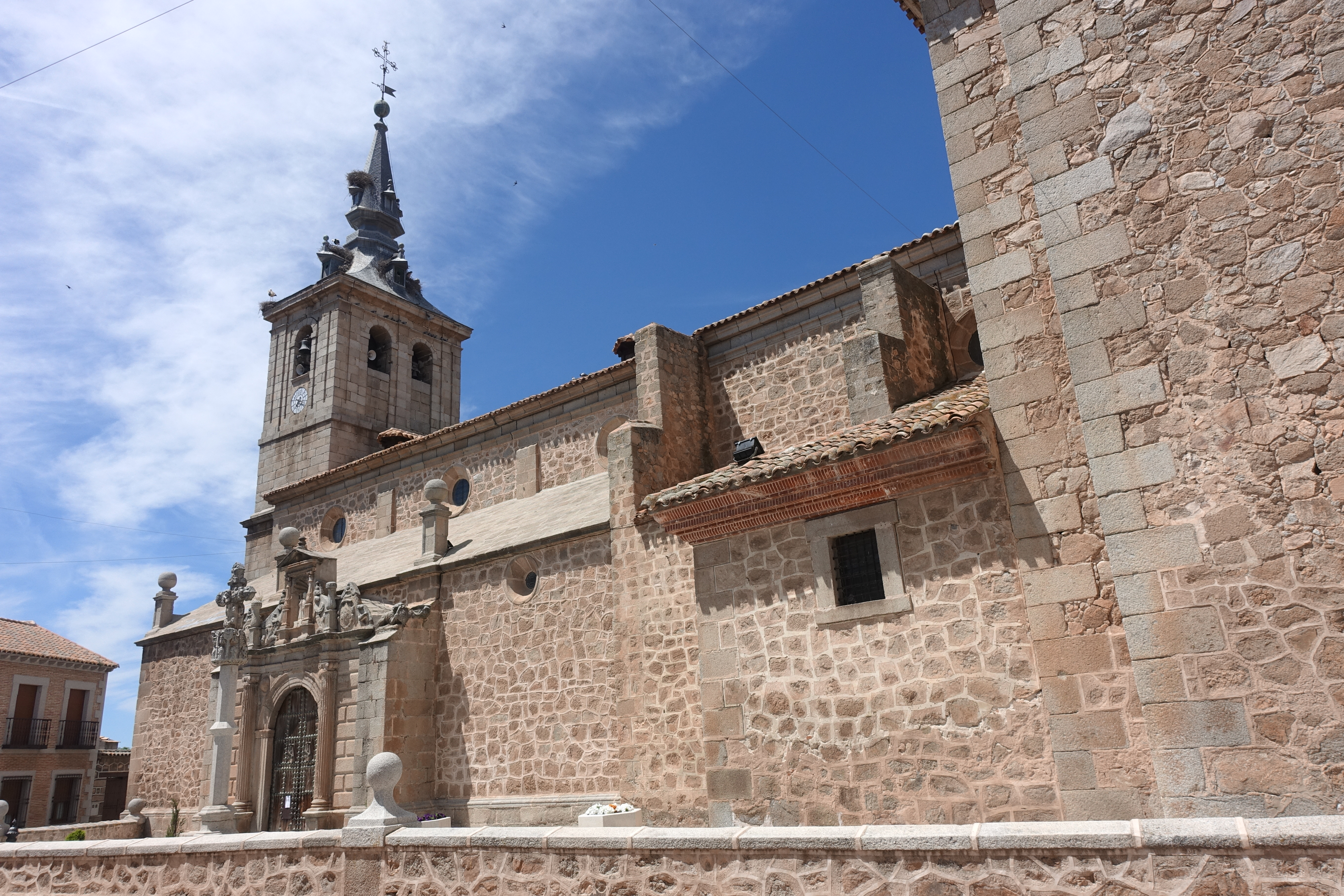 Iglesia de Santiago Apóstol, en Cuerva (Toledo, España).